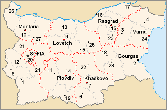 Sujet : carte des 9 « grands oblasti » (régions) de la Bulgarie ayant existé de fr:1987 à fr:1999 Auteurs : fond de carte créé par Потребител:Ljubo (Любомир Таушанов = Lyoubomir Taïchanov) pour Картинка:Bulgaria admin.png (version du 25 avril 2005) adaptation française, par Utilisateur:Hégésippe Cormier, pour un sujet différent Notes : un point rouge cerclé de noir donne la localisation d'une ville chef-lieu d'oblast et d'un okrag un point noir donne la localisation d'une ville chef-lieu d'un okrag l'étoile noire montre la localisation de la ville de Sofia, à la fois capitale nationale, chef-lieu de l'oblast de Sofia-Grad et où siégeait le gouverneur de l'oblast de Sofia (hors Sofia-Grad) la numérotation des okragi suit l'ordre alphabétique français, et n'est pas utilisable sur les autres wikis les limites des « grands oblasti » sont en rouge les limites des okragi (futurs oblasti) sont en gris clair. Licence : Catégorie:Cartes de Bulgarie